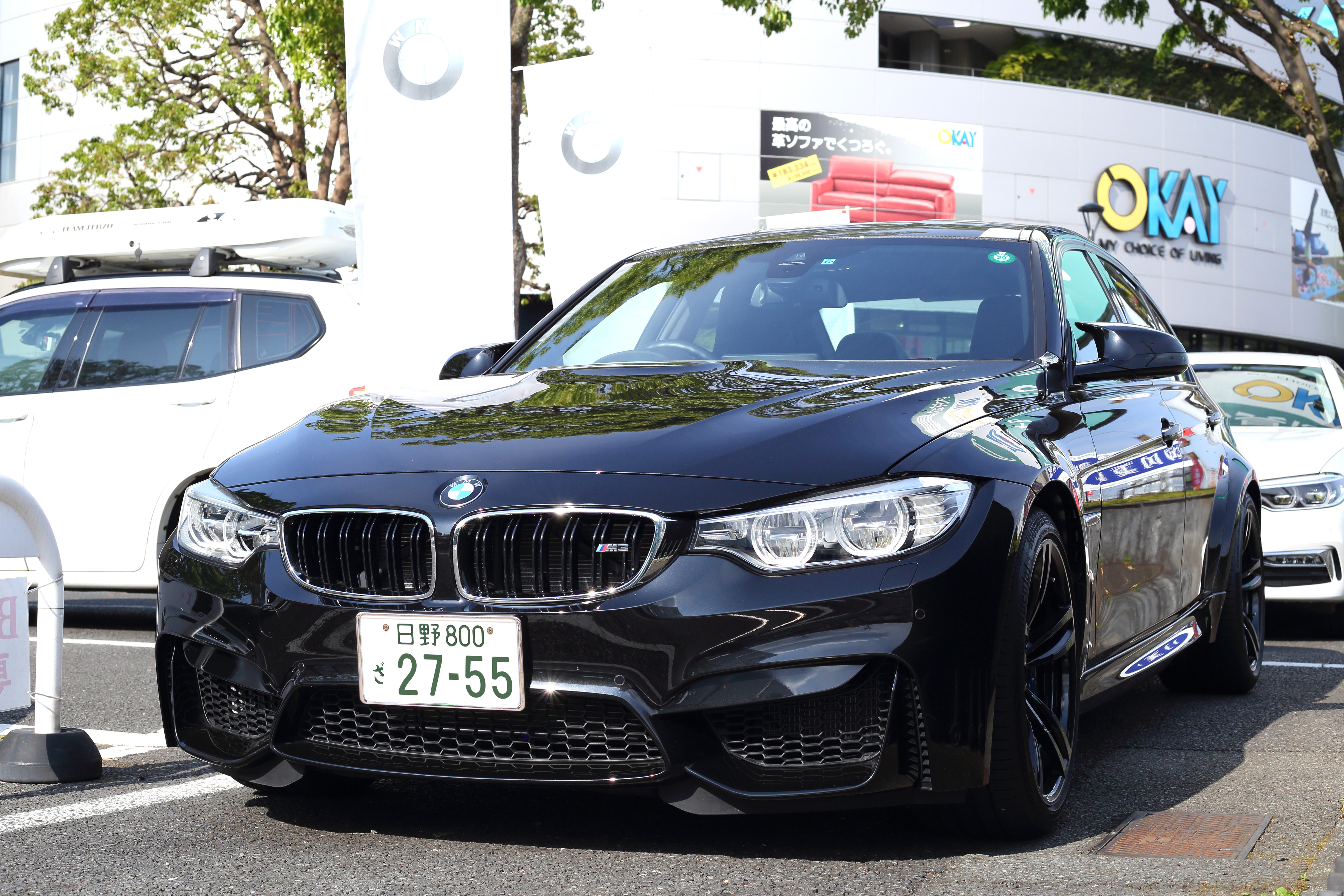 BMW・M3（F80）。村内BMW八王子支店にて。